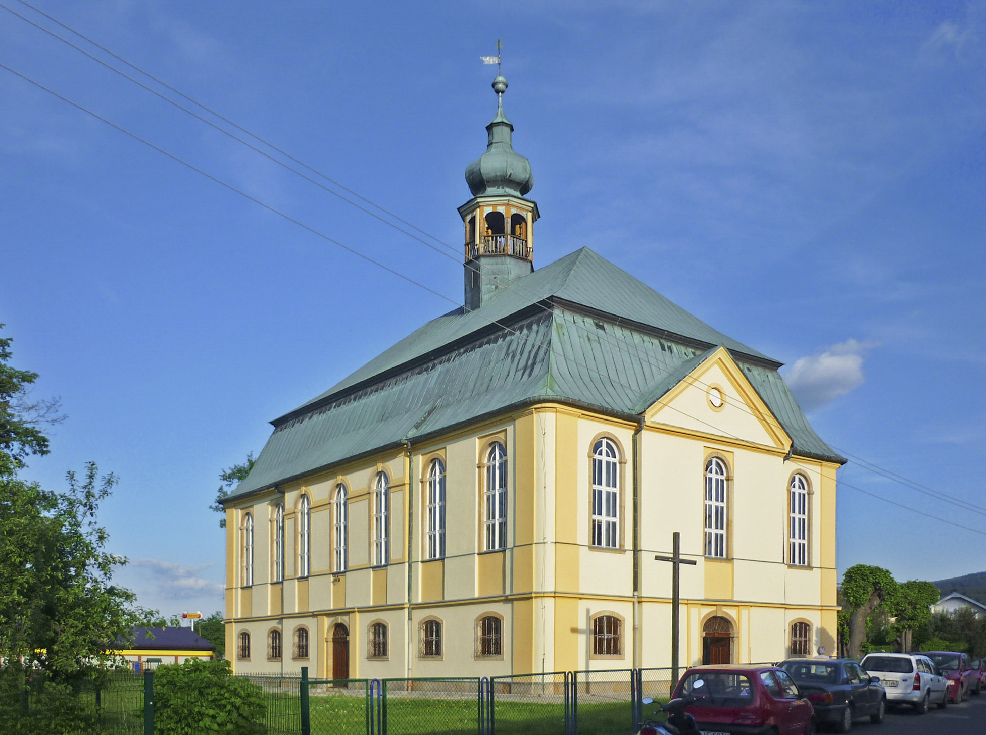 Podgórzyn in Polen (Giersdorf im Riesengebirge) - ehemalige evangelische Bethaus-Kirche, jetzt katholische Kirche Hl. Maria von Częstochowa